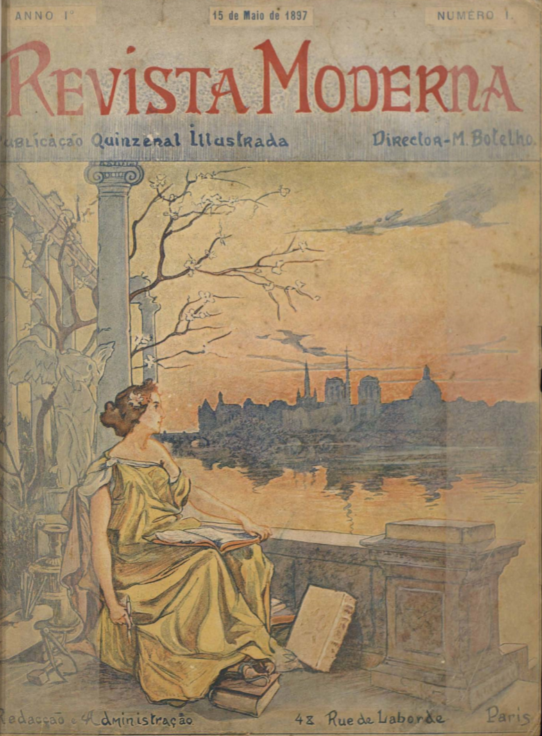 Capa da "Revista Moderna", ano 1, n. 1, 15 de maio de 1897.